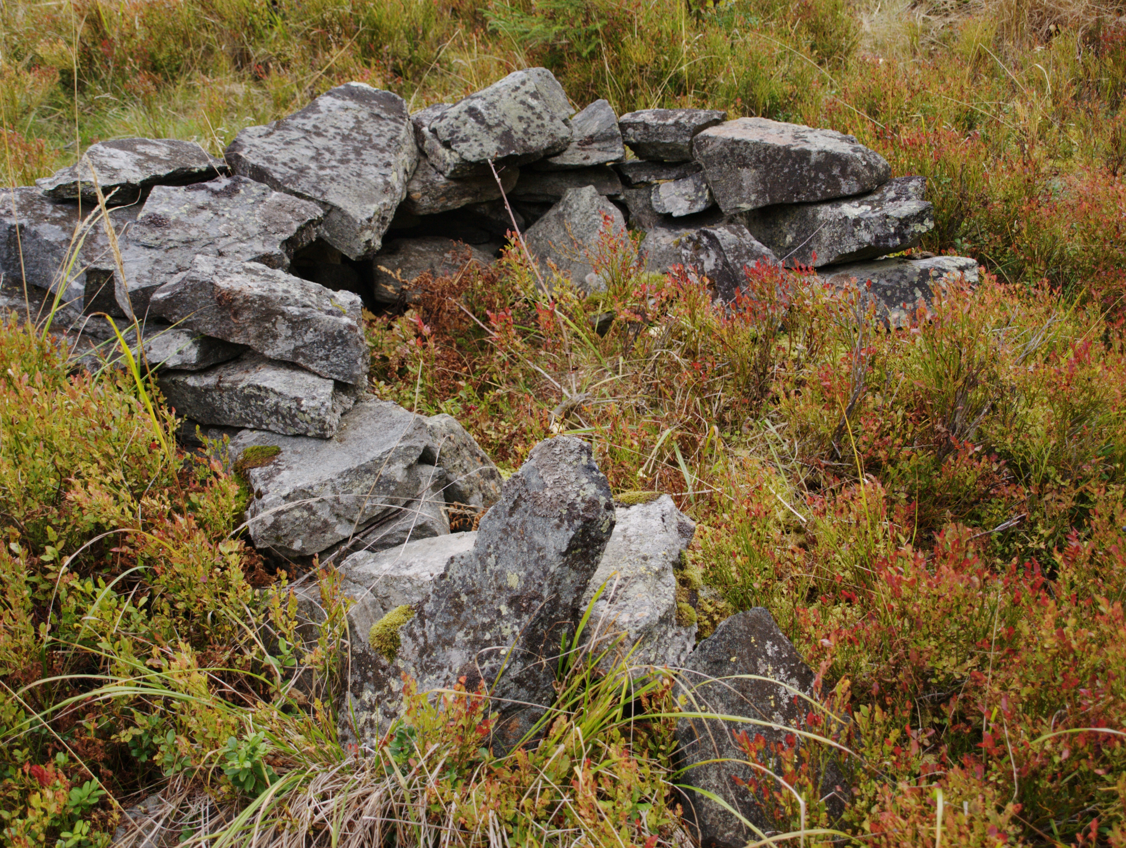 Bogastelle at Valdres Folkemuseum on Storøya outside Fagernes in Nord-Aurdal.